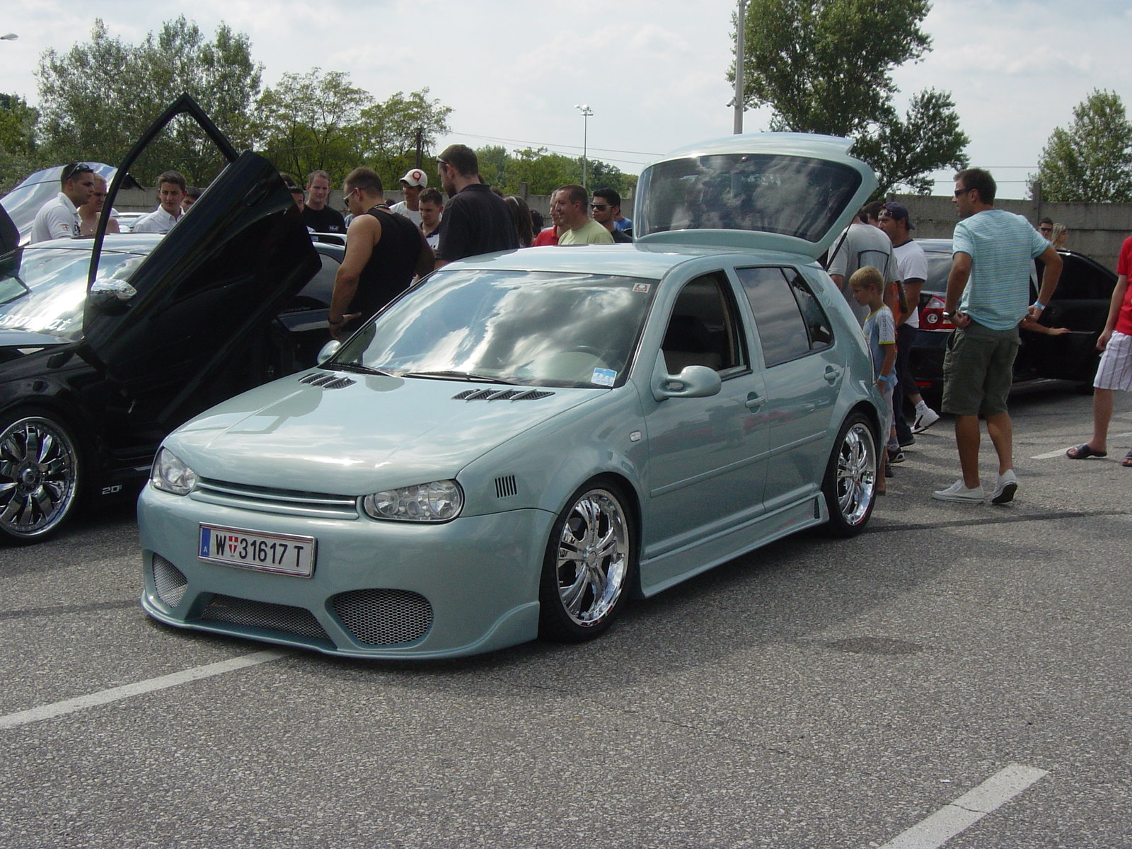 Volkswagen Golf